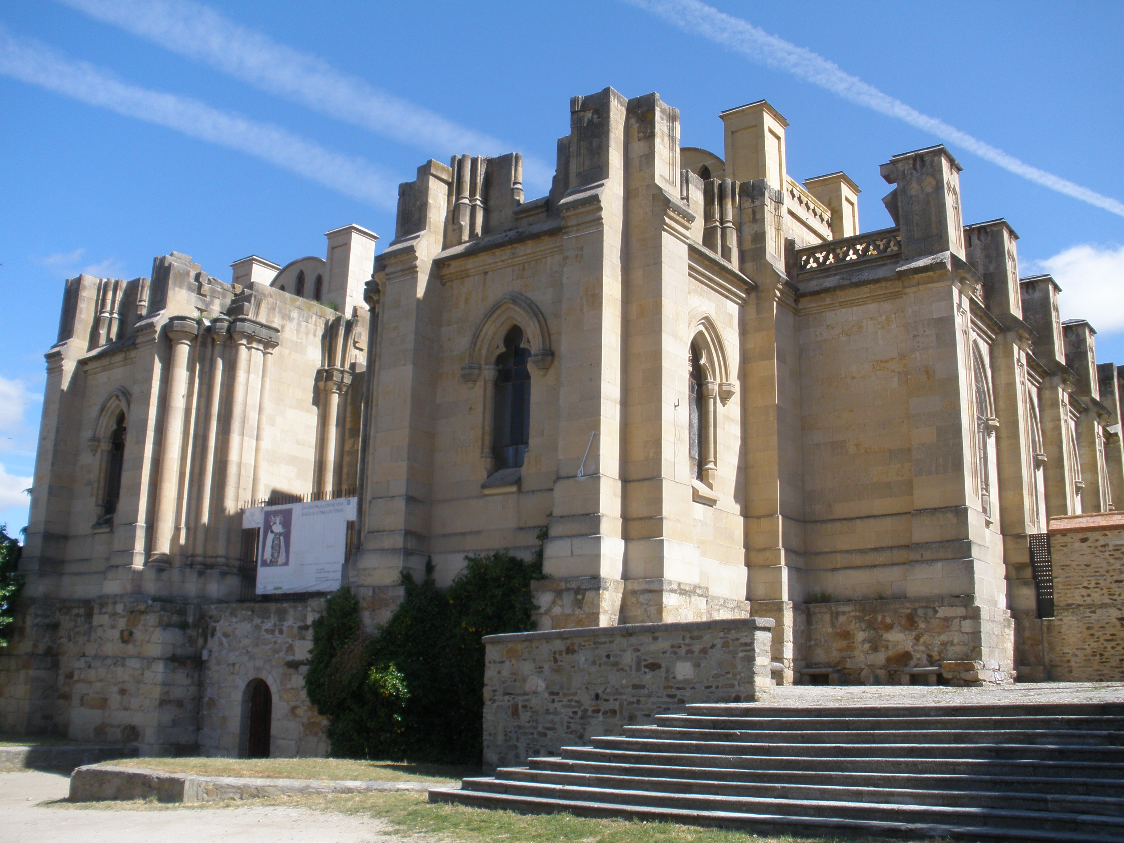 Basílica inacabada de Santa Teresa de Jesús en Alba de Tormes